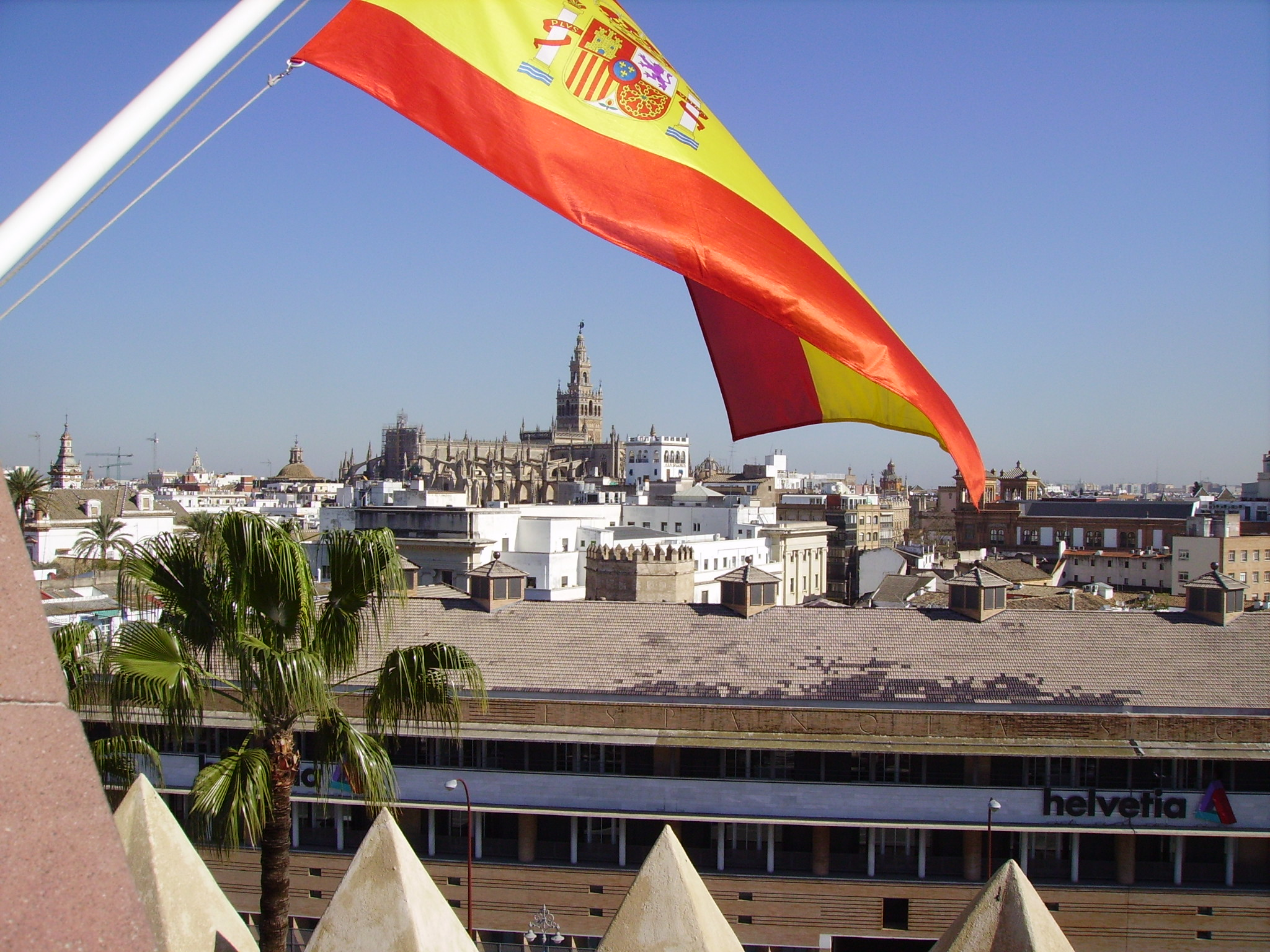 Siviglia, Cattedrale, Torre d'Oro Catedral de Sevilla y vista parcial de la Torre de la Plata (vista desde la Torre del Oro)